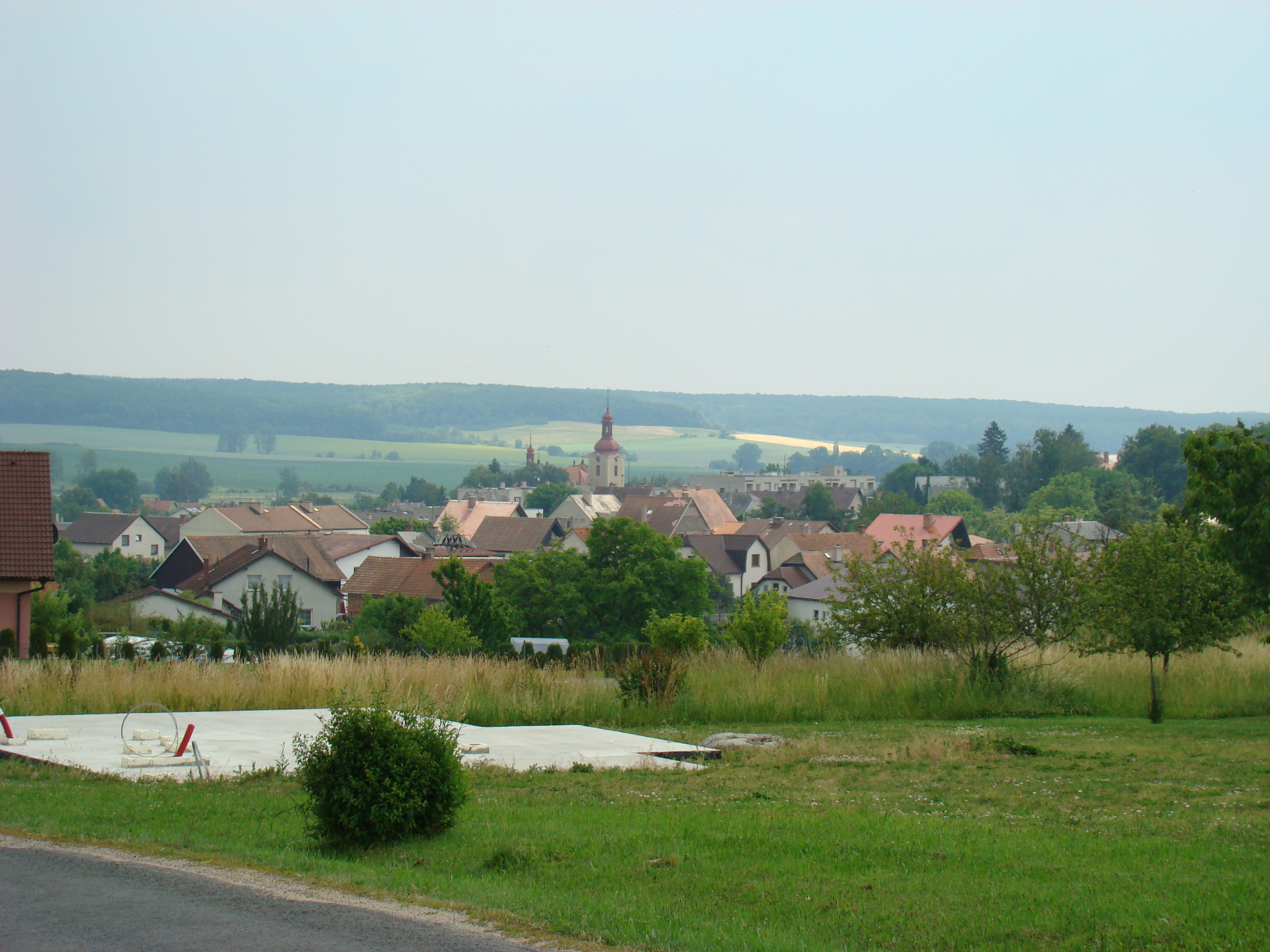 Pohled na kostel a obec Libáň od vodárny, 2010